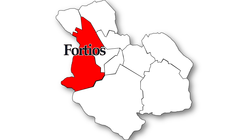 Evolução da População